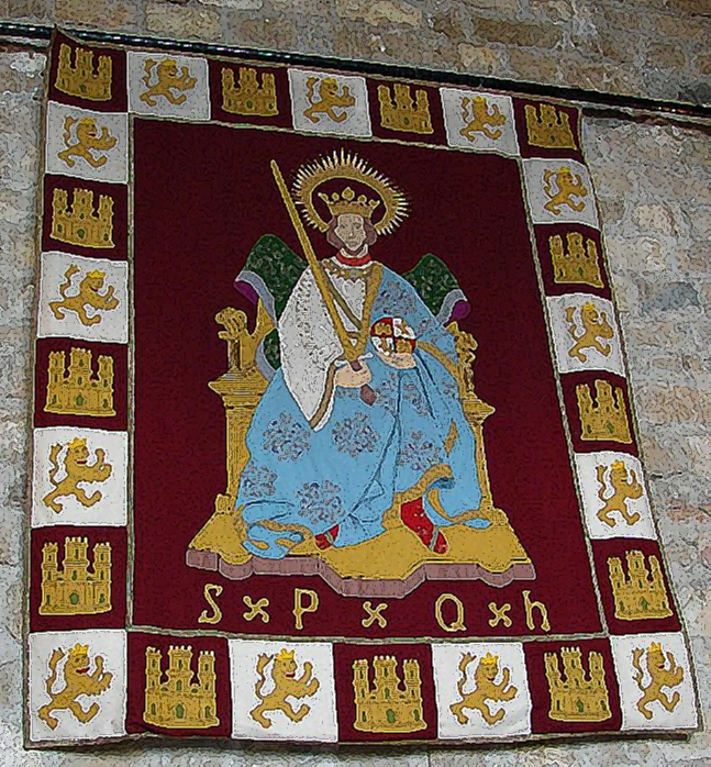 Fernando III el Santo († 1252), rey de Castilla y León, patrón del Real Sitio de San Fernando.